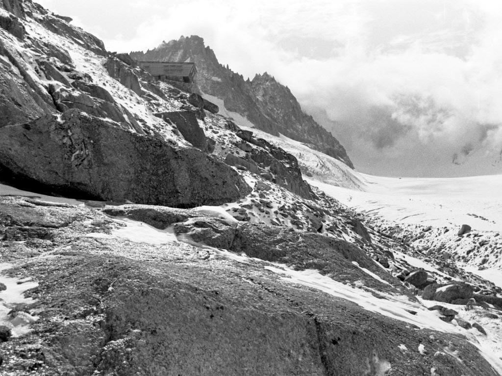 Le refuge d'Argentière.